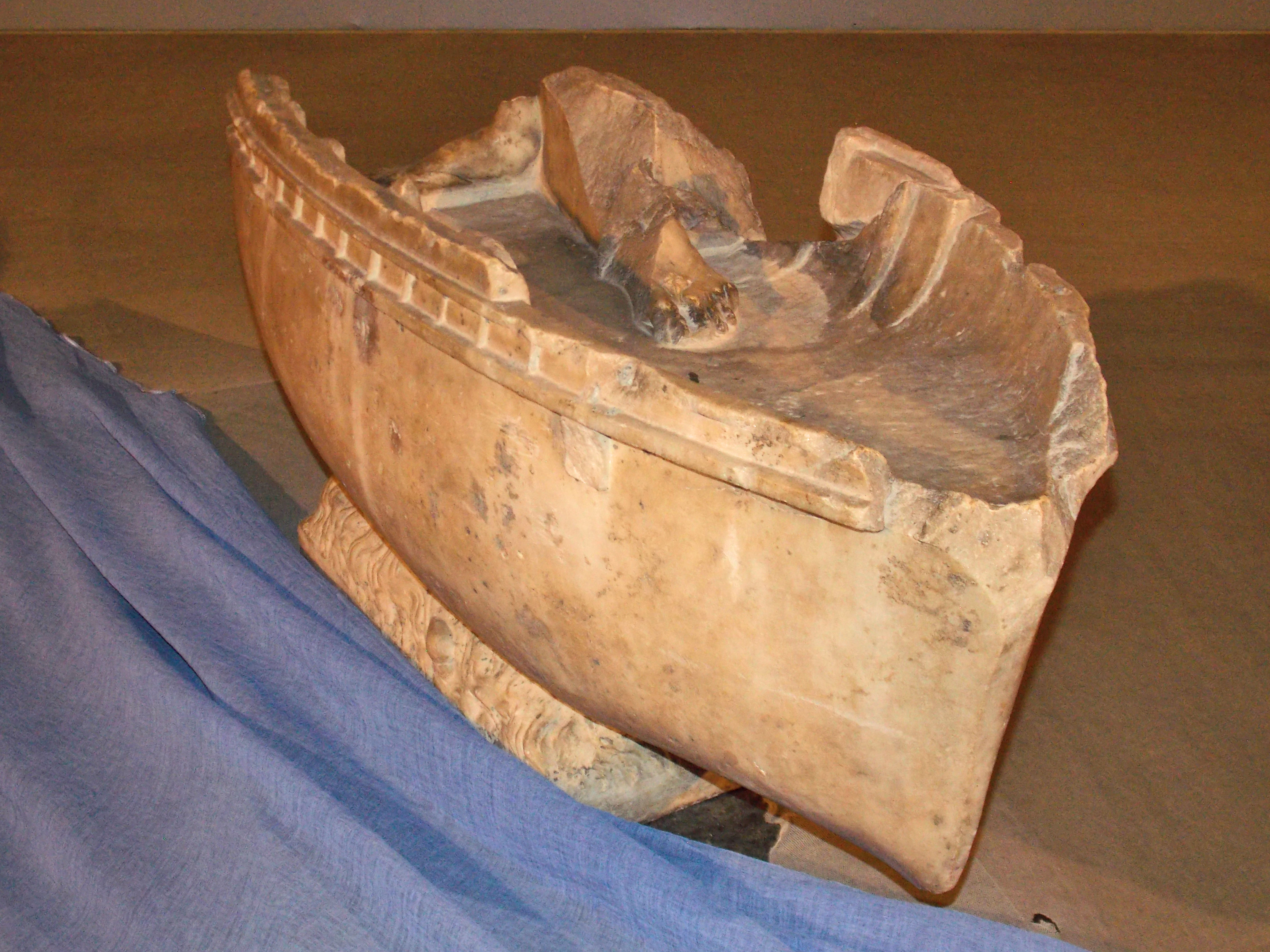 Un reperto del tempio di Iside di Benevento conservato nella sezione egizia del Museo del Sannio, presso il museo ARCOS. Basamento di statua di Iside Pelagia.